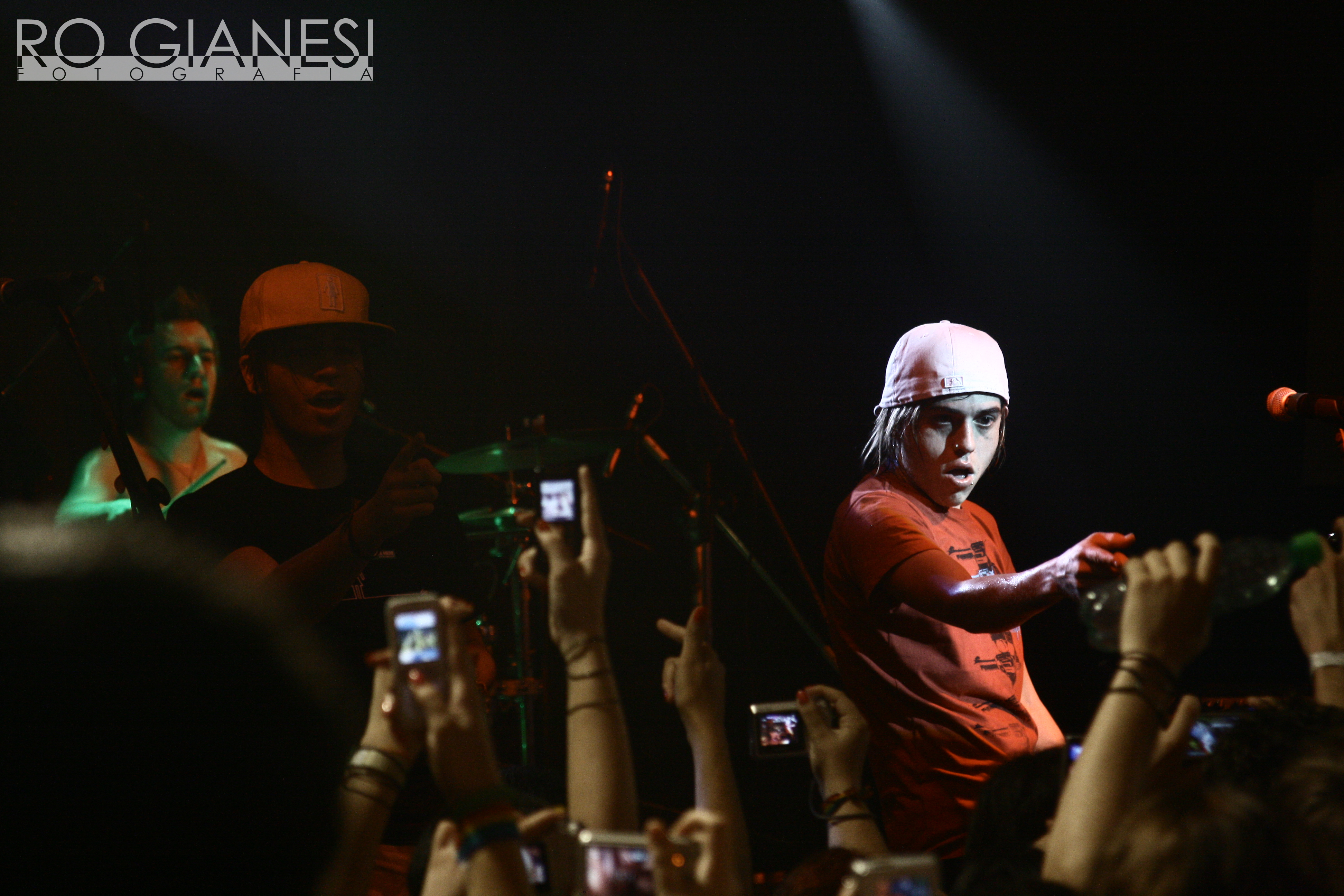 Banda Cine ao vivo no Plaza Hall, Sorocaba - São Paulo.